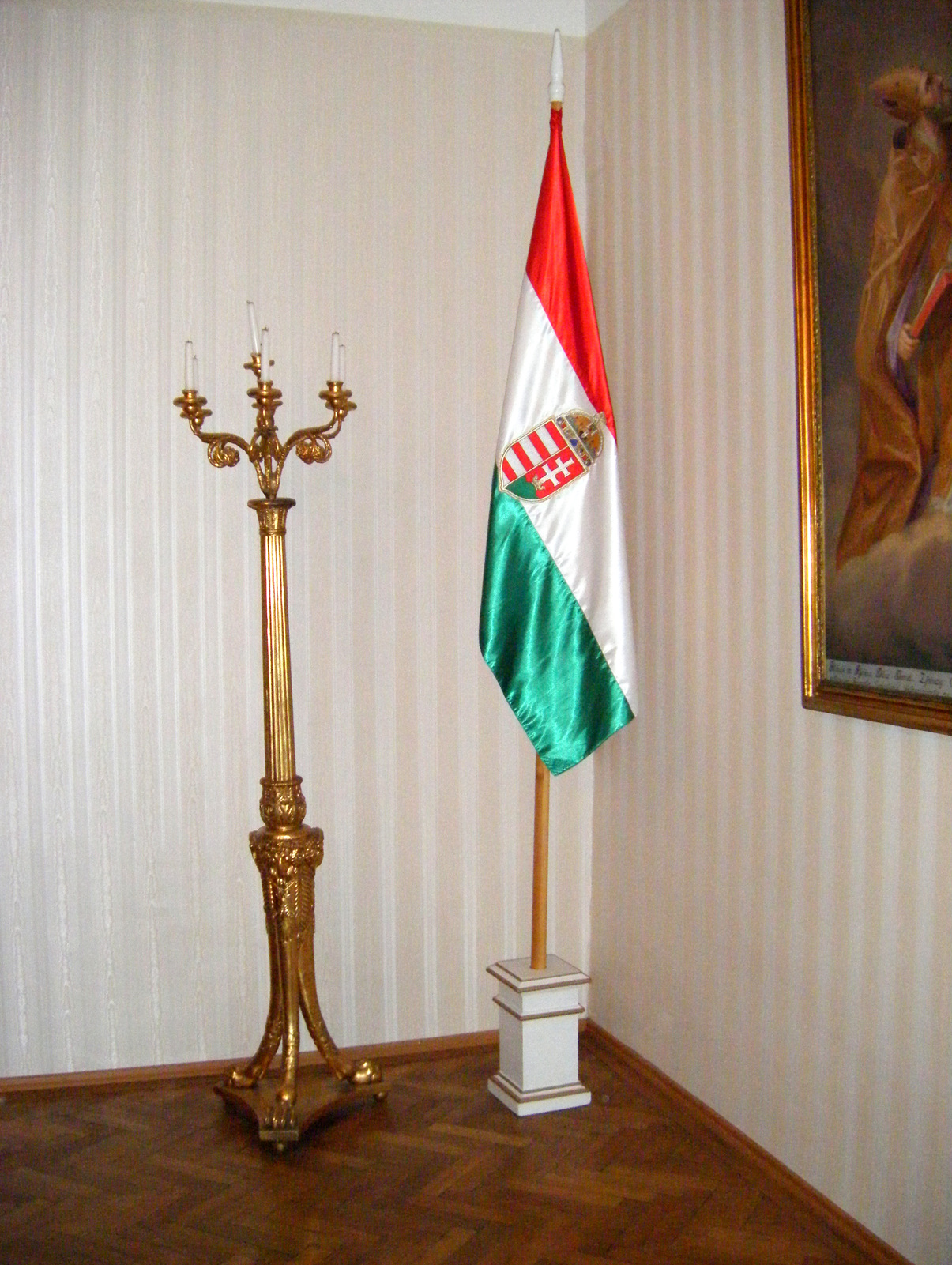 Pázmáneum